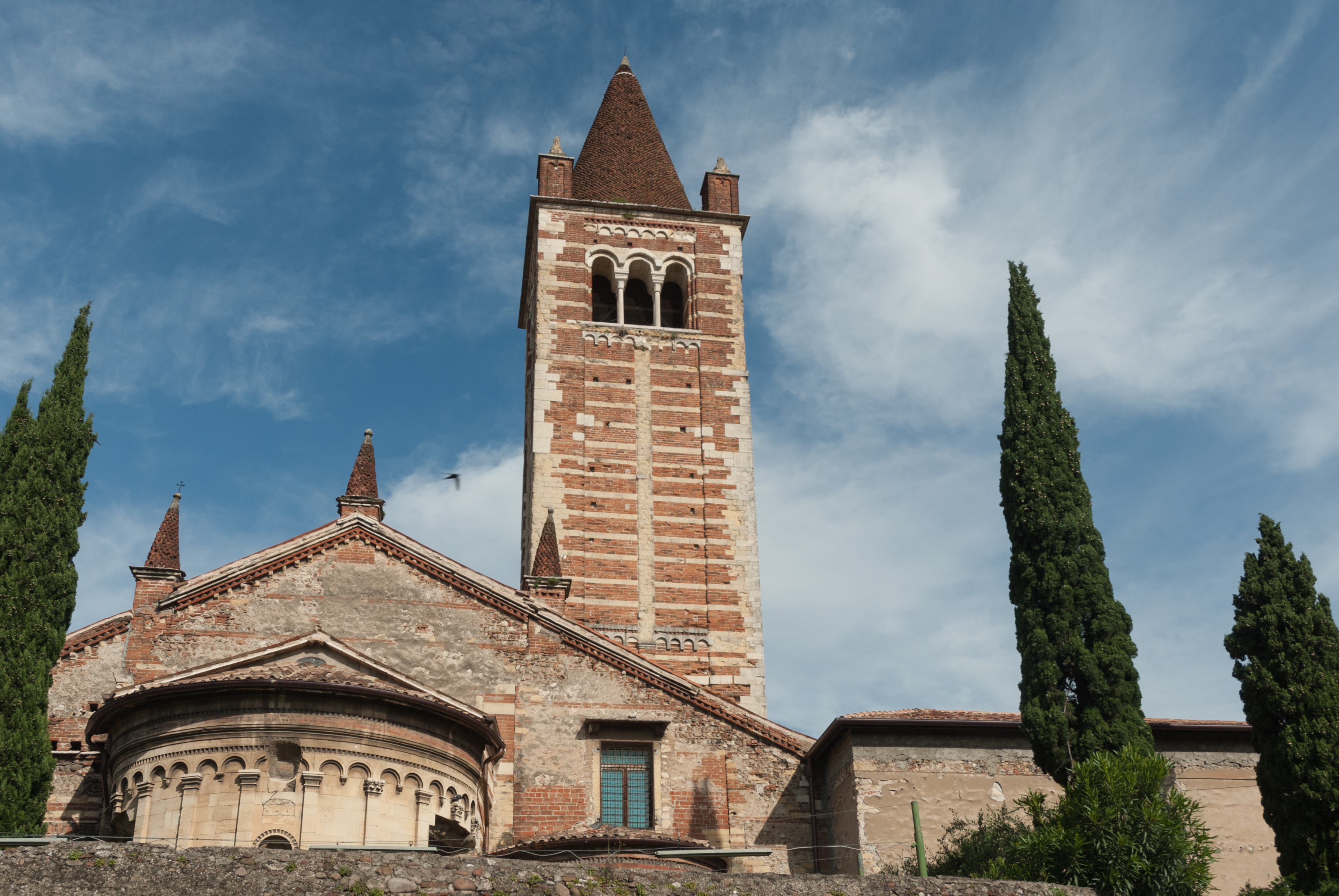 Santissima Trinità a Verona, dal Sudest